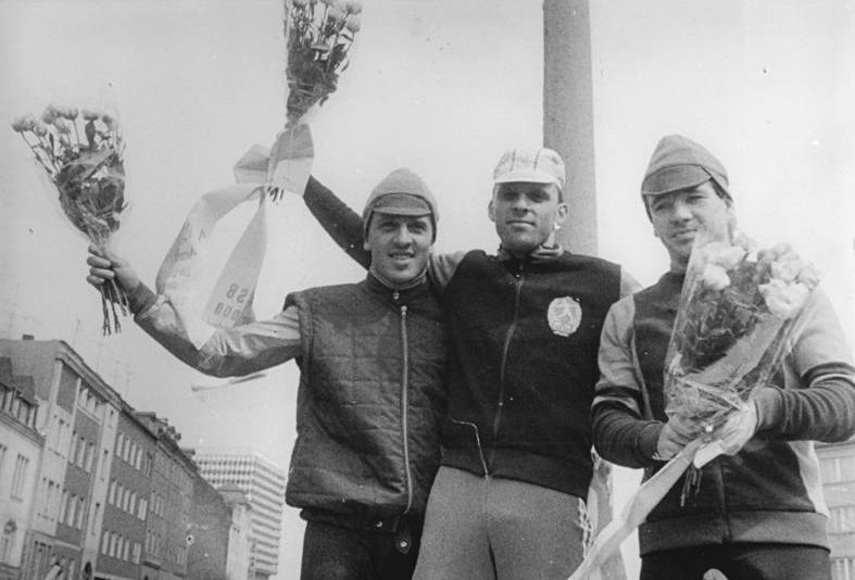 Olaf Jentzsch, Uwe Ampler, Dan Radtke ADN-ZB Kasper 23.4.86 Berlin: Zeitfahren - Siegerehrung nach dem Einzelzeitfahren über 35 Kilometer. Den ersten Platz mit 45:43 min belegte Uwe Ampler (SC DHfK Leipzig, M.). Auf den zweiten Platz kam mit 46:08 min Olaf Jentzsch (SC Cottbus, l.) vor Dan Radtke (ASK Vorwärts Frankfurt-Oder, r.), der eine Zeit von 46:13 min erreichte.